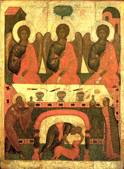 Св. Троица Икона. Псков.